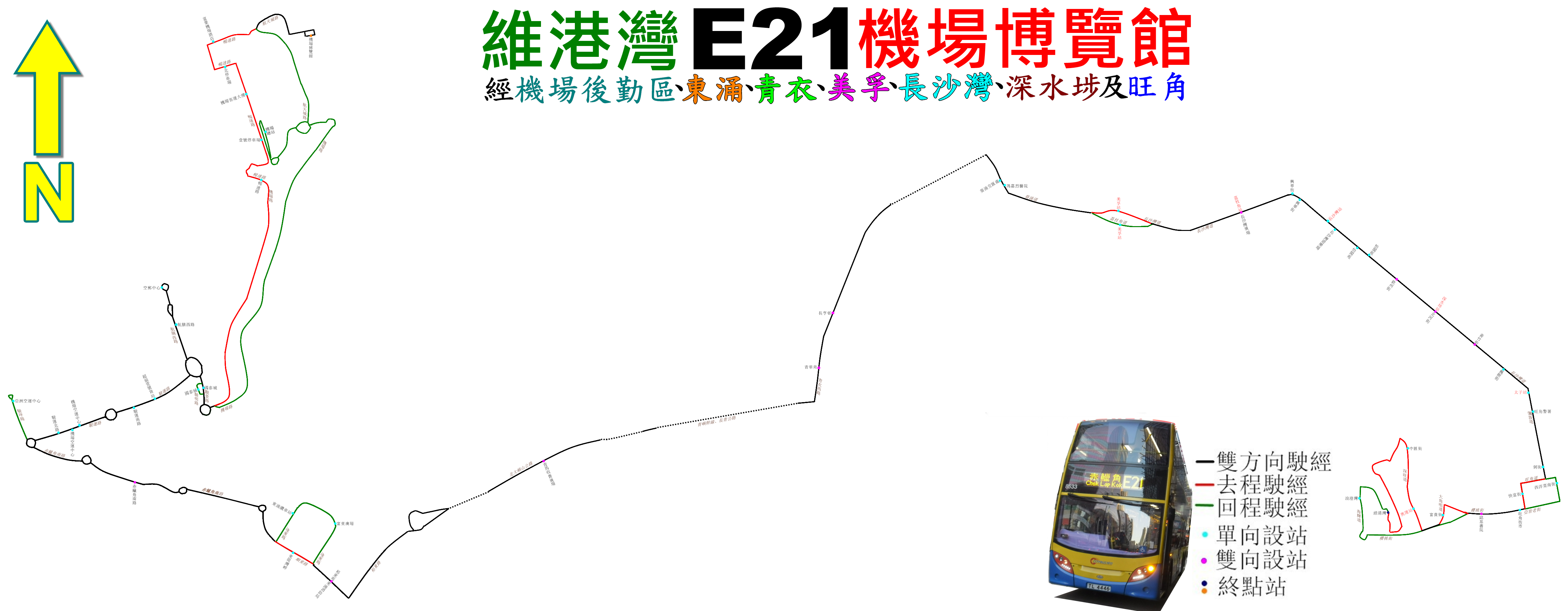 中文（香港）: 城巴E21線的走線圖